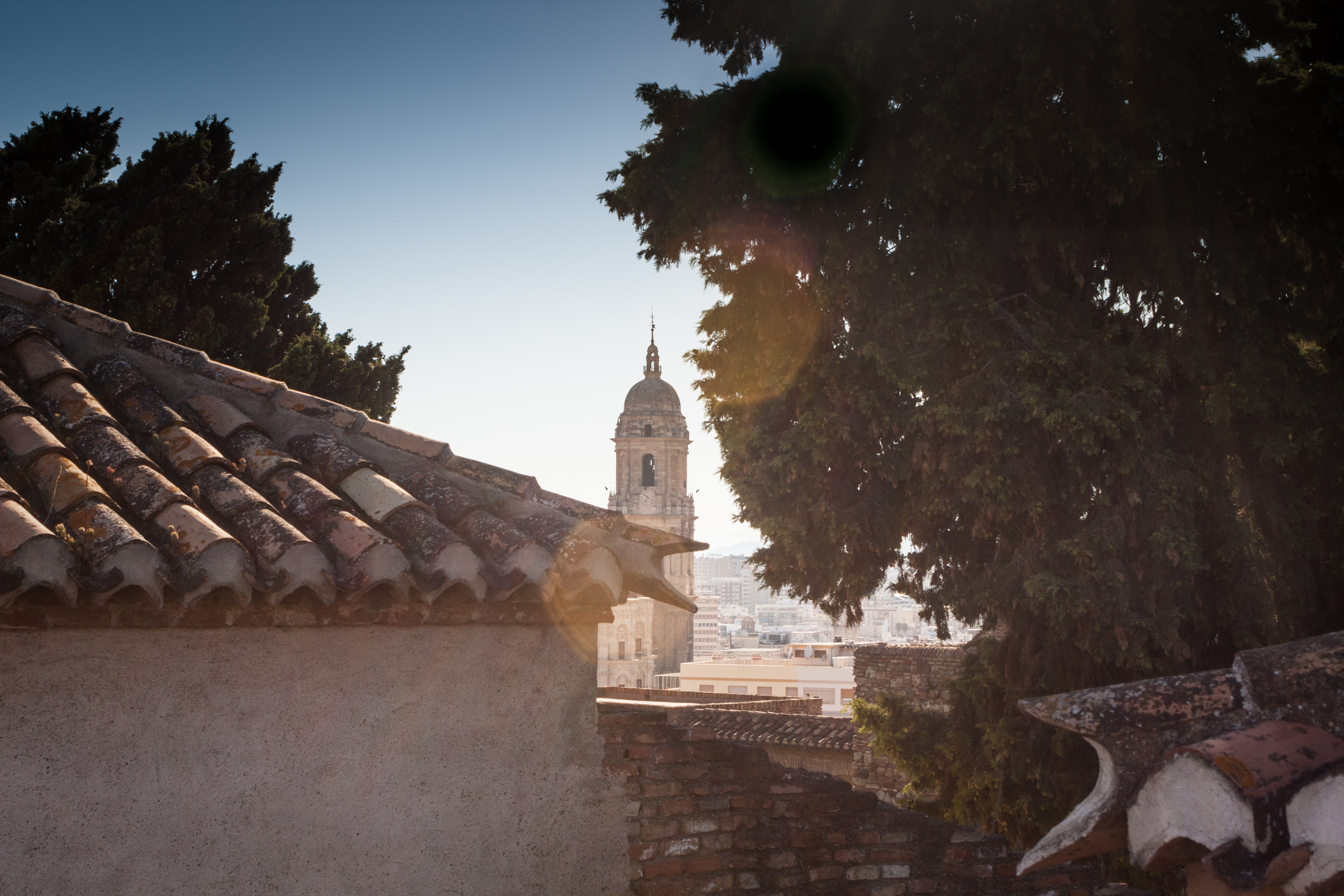 Torre de la Catedral vista desde la Alcazaba, Málaga, España.